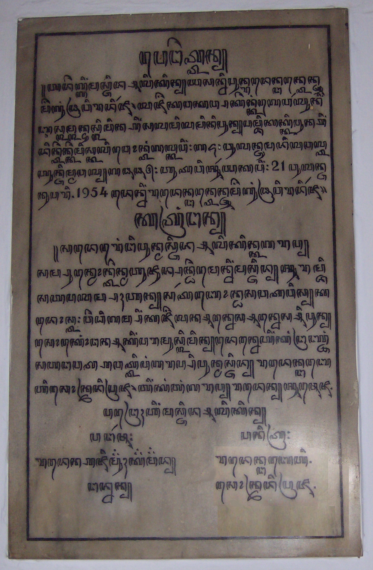 Inscription in Sholihin mosque Surakarta